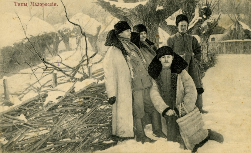 Дореволюционная открытка Российской империи из серии «Малороссийские типы».